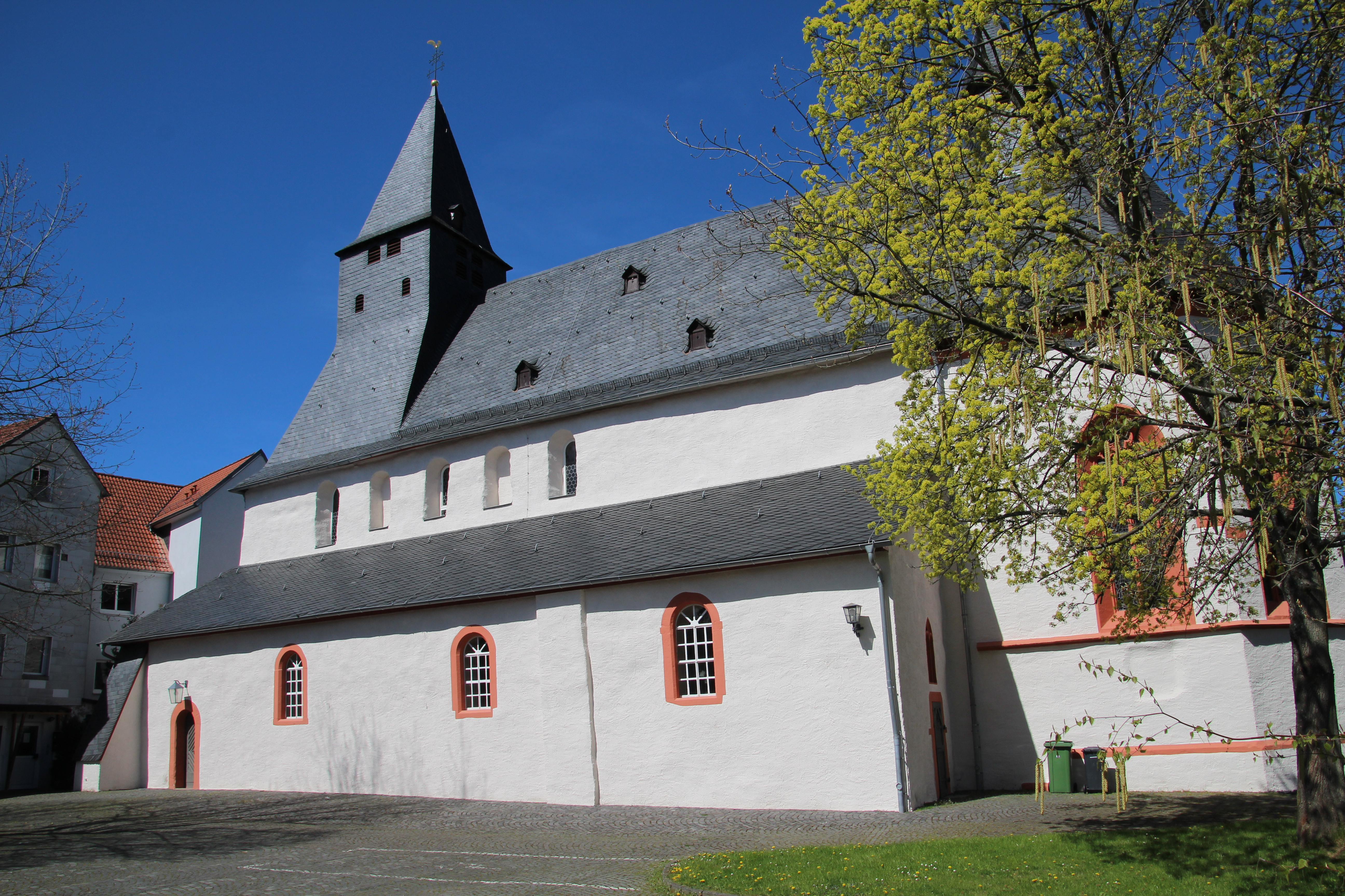 Kirche